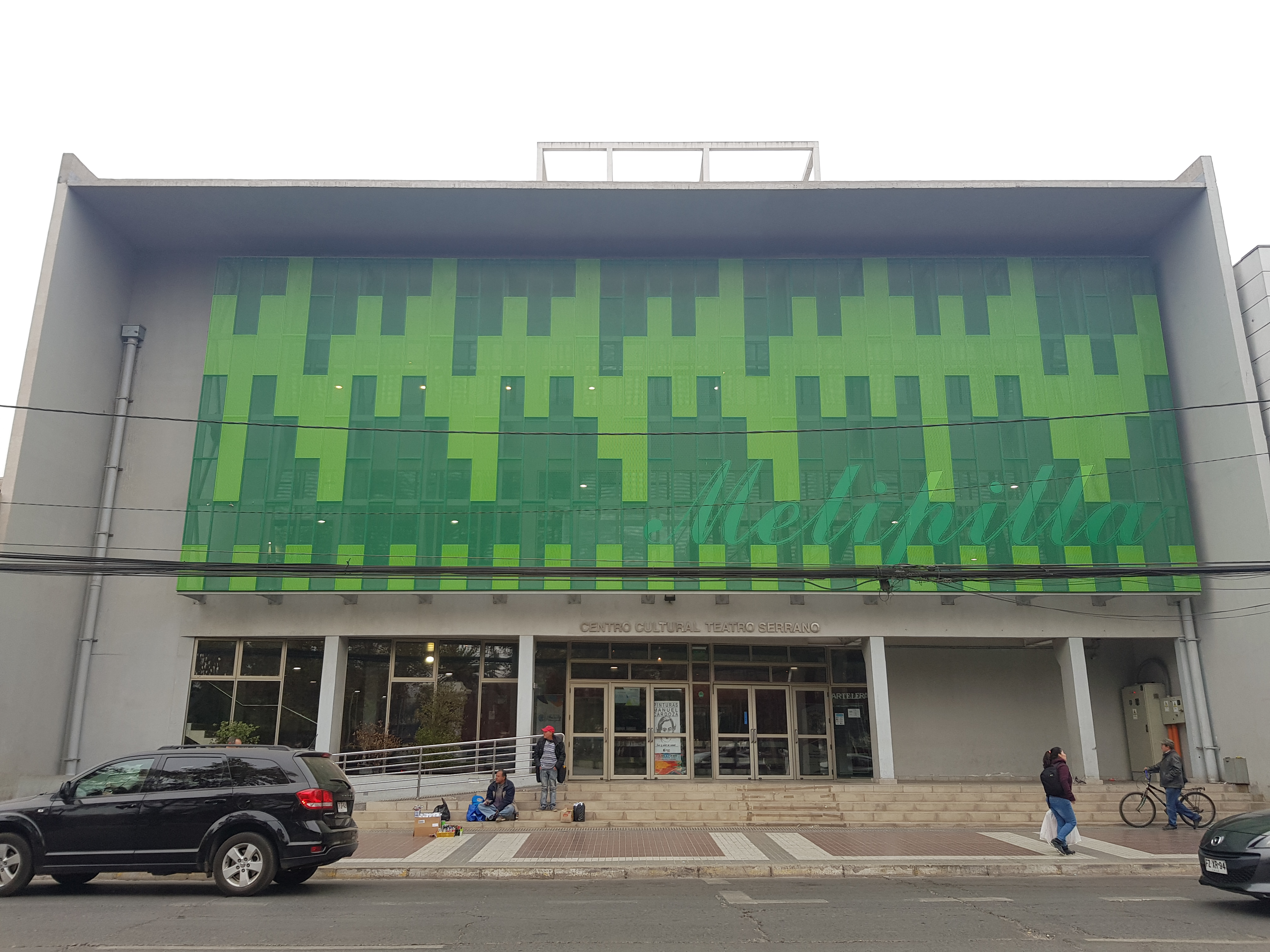 Fotografía tomada desde fuera del Centro Cultural Teatro Serrano de la provincia de Melipilla, Región Metropolitana.